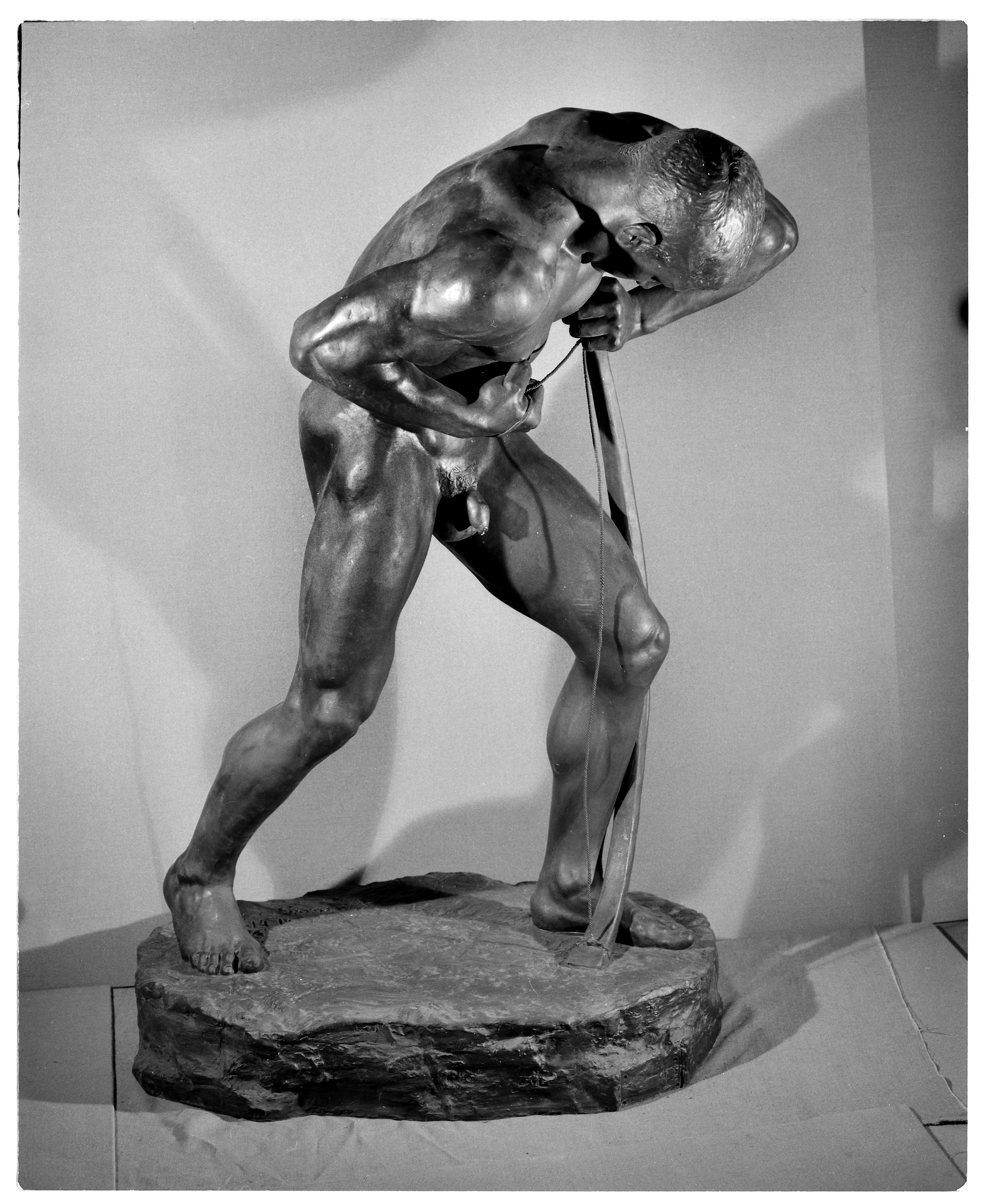 Un homme nu tend un arc A. Marzolff L'Archer (MAMCS)